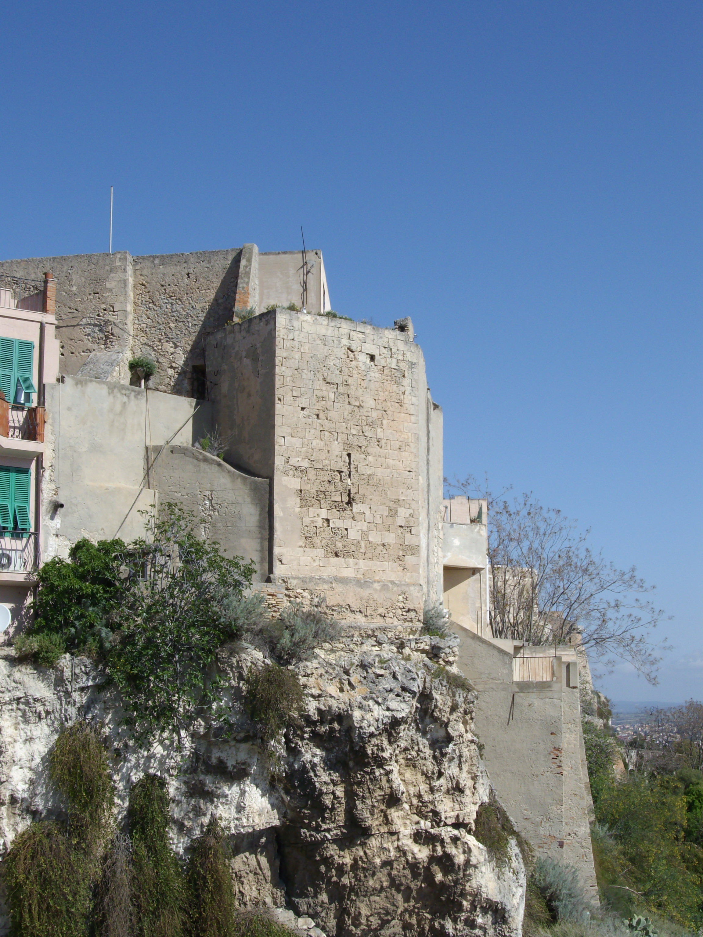 Retro della chiesa di Santa Lucia, Cagliari